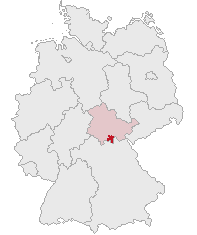 Landkreis Sonneberg, Thuringia, Germany